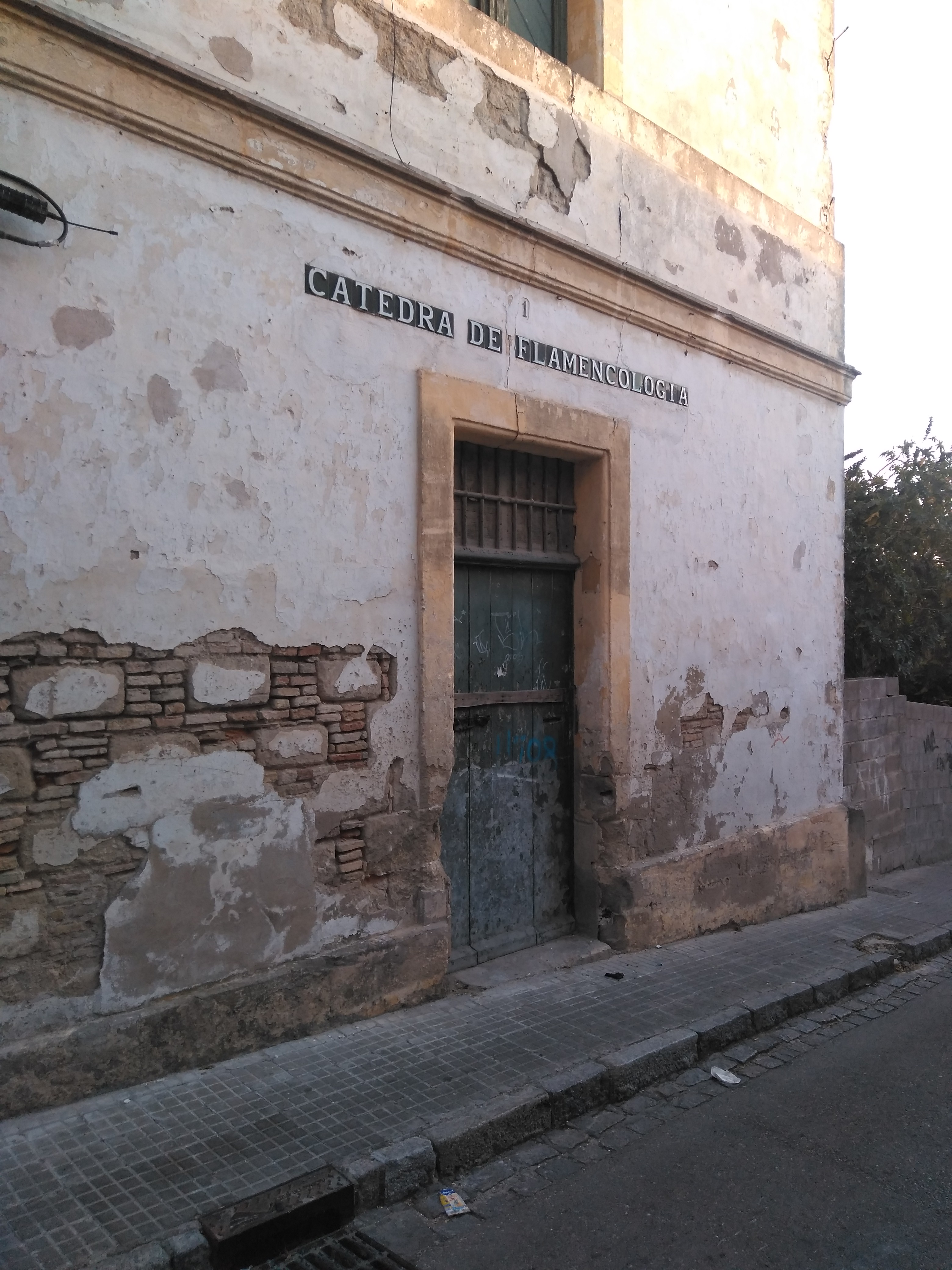 Cátedra de Flamencología de Jerez de la Frontera (sede antigua). España